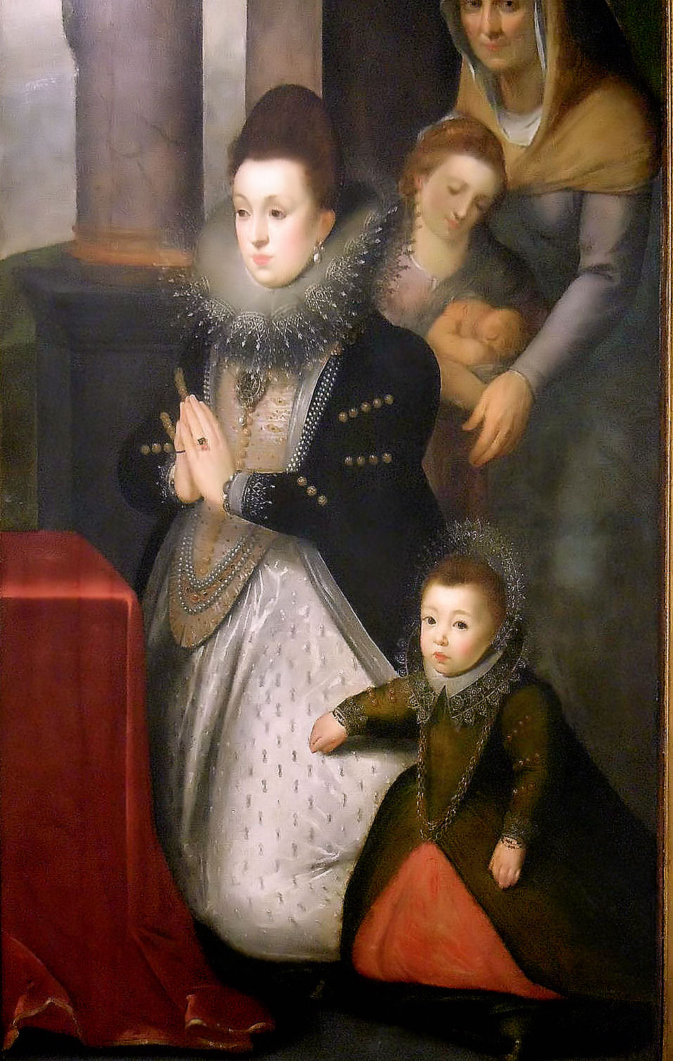 Anna Ximenes of Aragon Rodriguez de Evora 1601 by Otto Venius